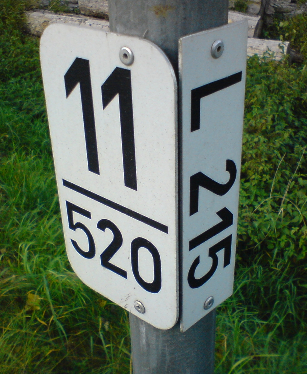 Kilometermarkierung, Unterinntalstraße, Ende 2. Teil